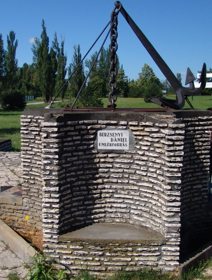 Berzsenyi Dániel-emlékforrás Balatonfüreden